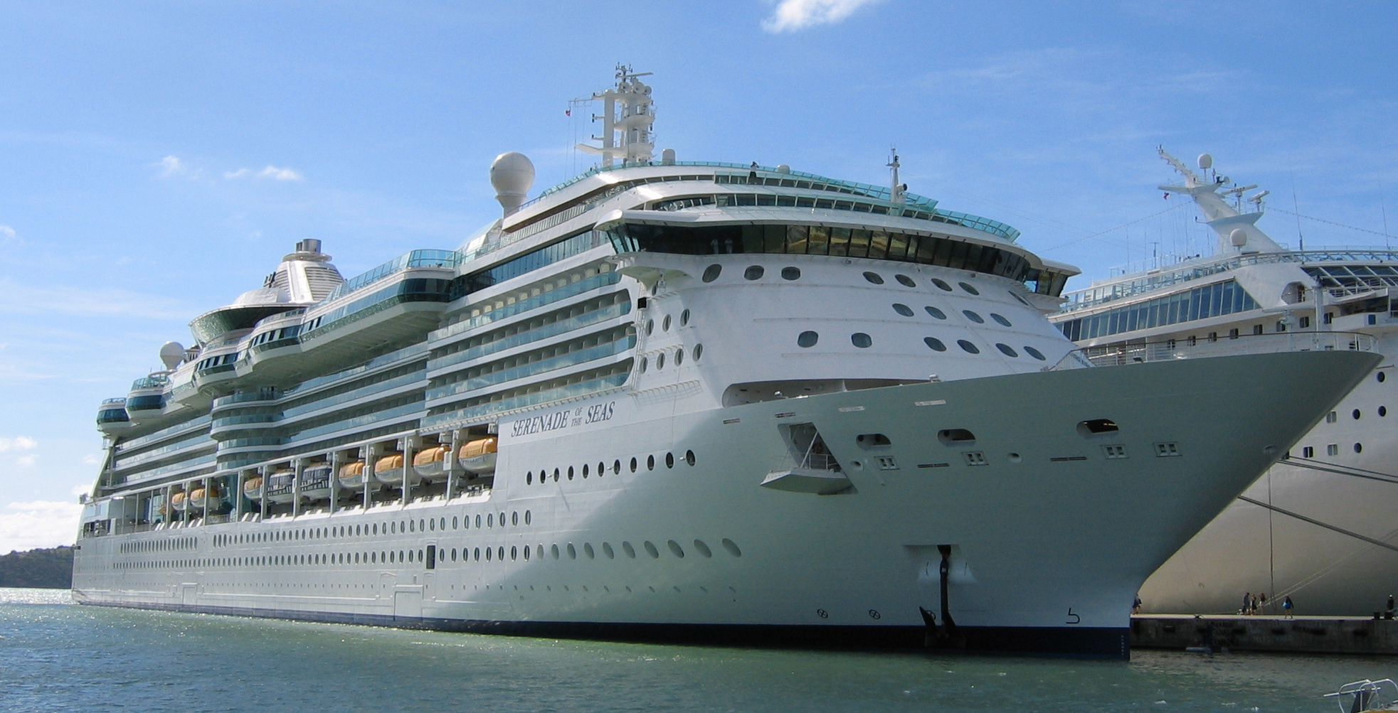 Our ship